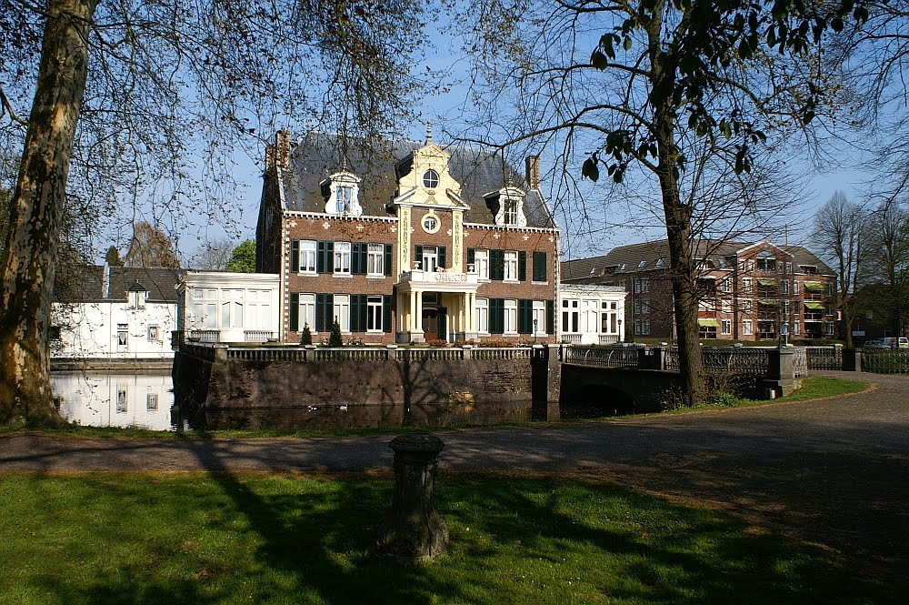 Huis Severen te Maastricht.